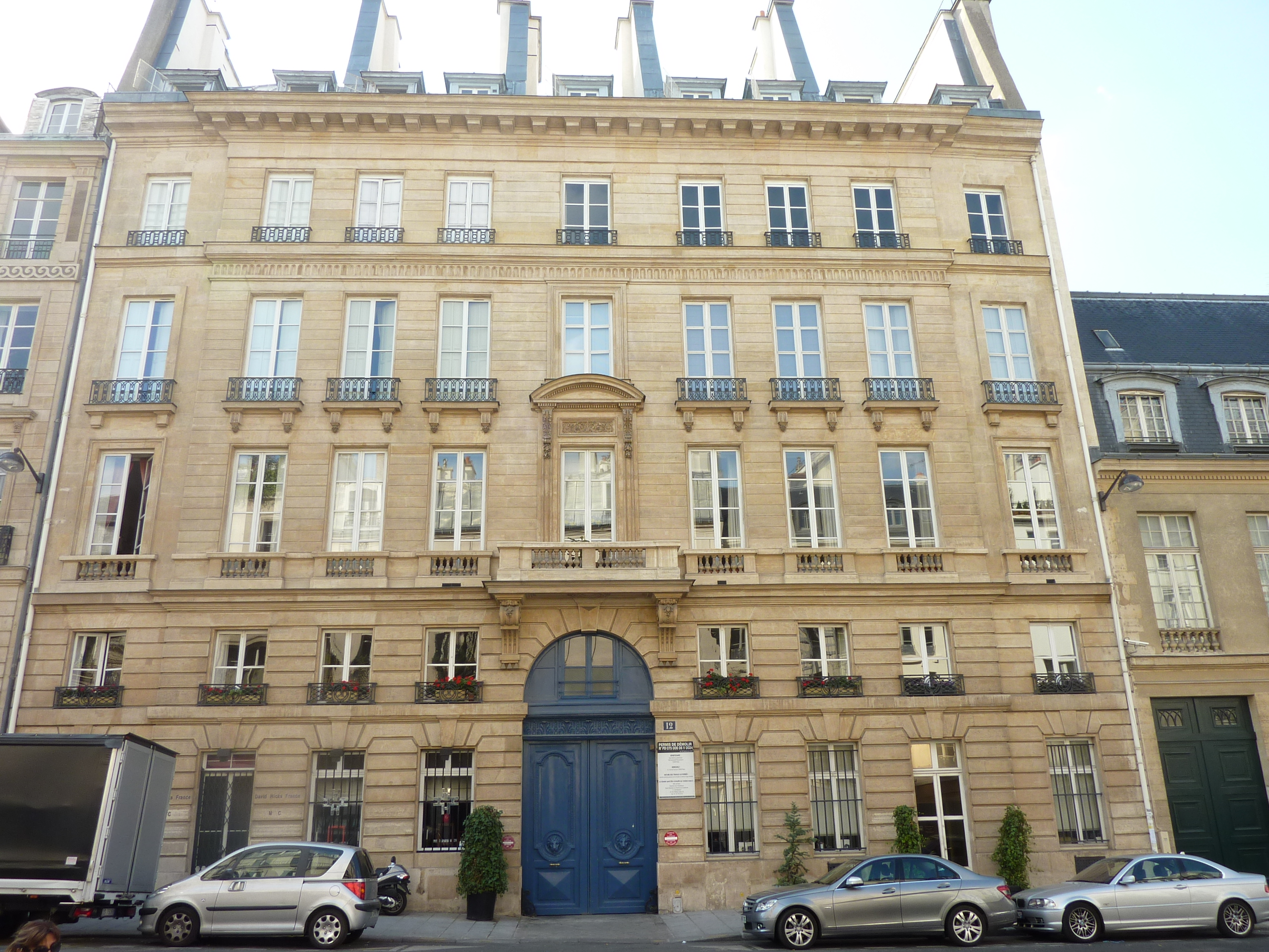 Grand Hotel d'Entragues .